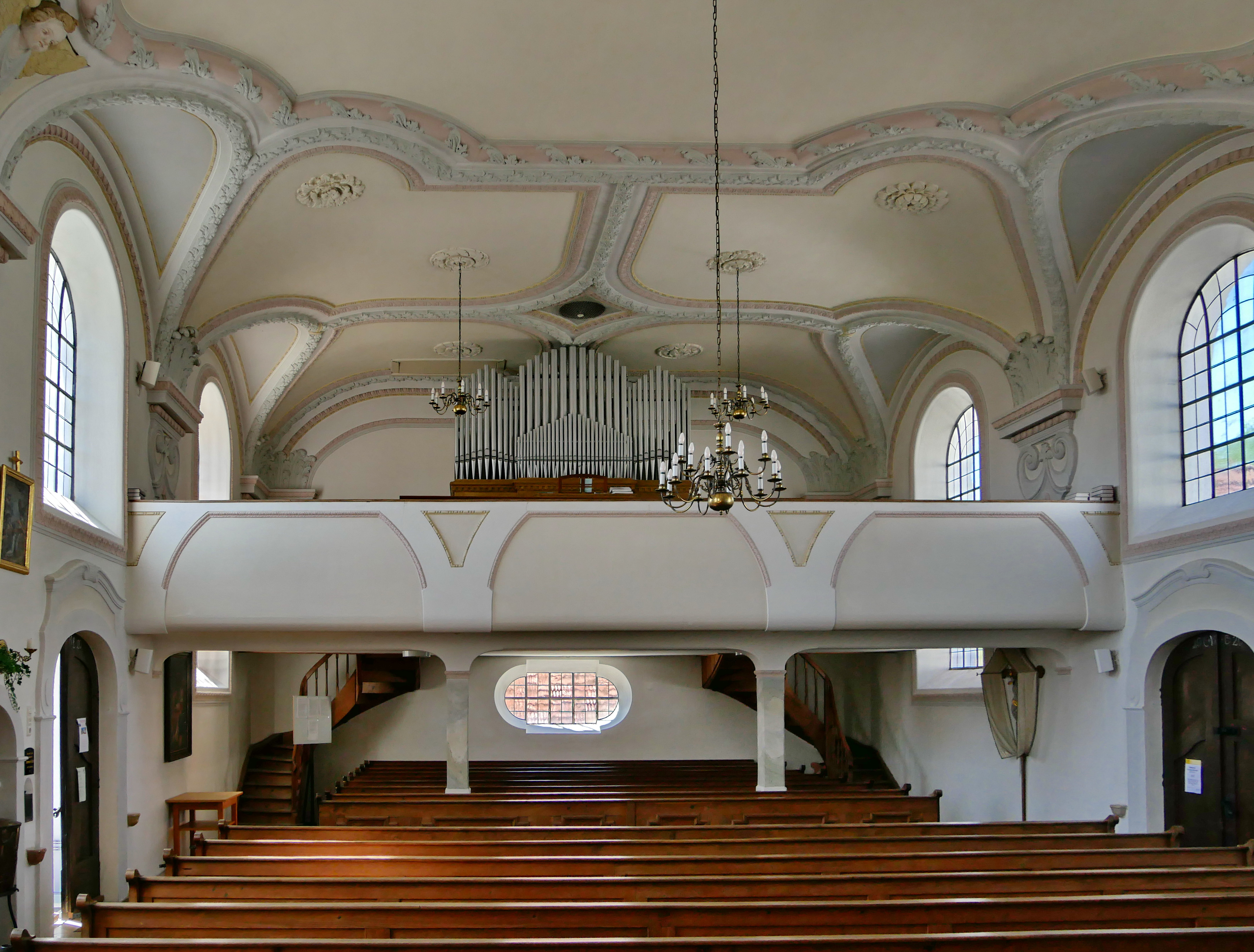 Maisach, Ortsteil Rottbach: Katholische Pfarrkirche St. Michael. Blick zur Empore. Die Orgel wurde 1942 von der Mühldorfer Firma Glatzl aufgestellt (Information aus einer offensichtlich orts- und sachkundigen, aber nicht näher bezeichneten Informationsschrift im Kircheninneren, siehe Bild 033…035)